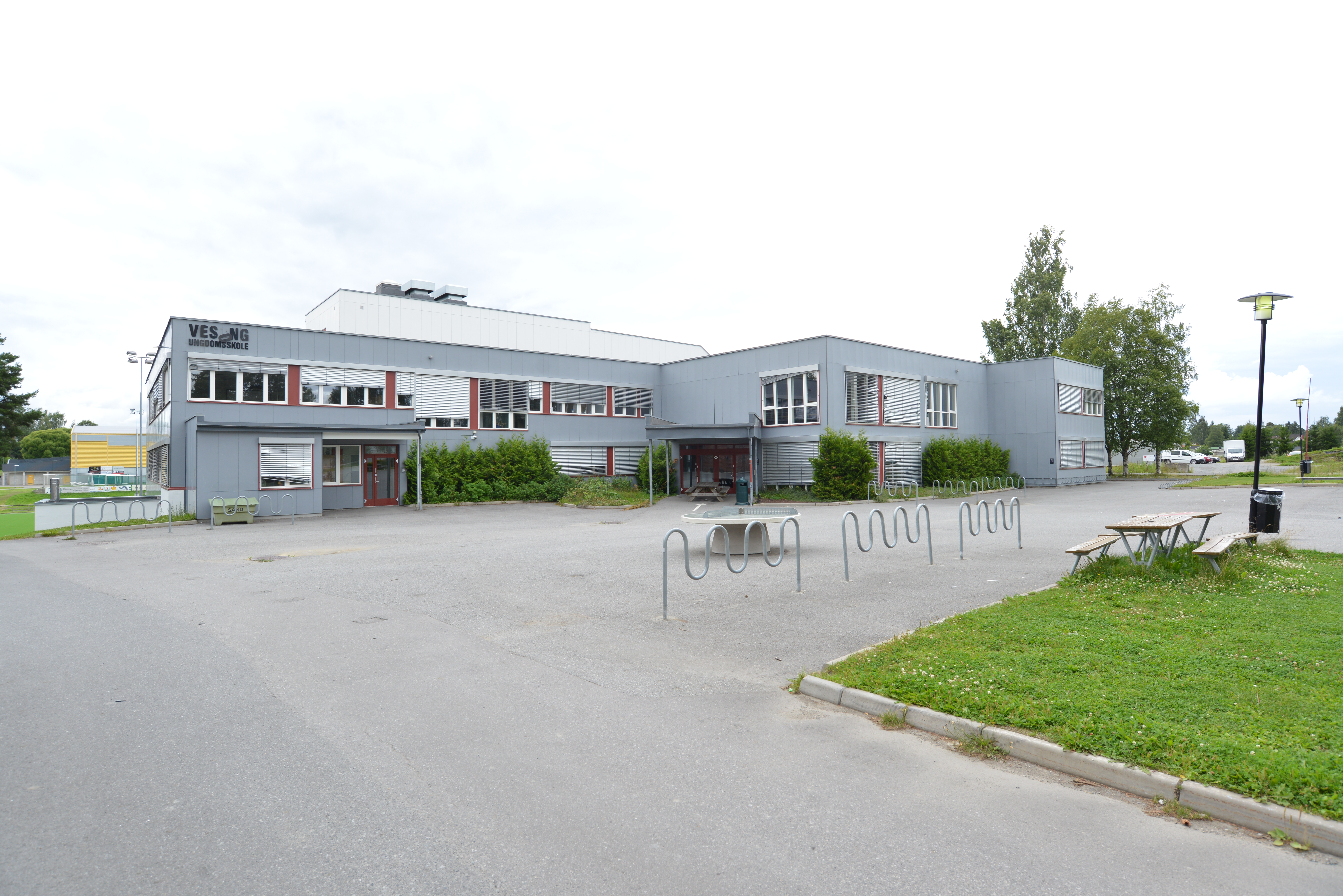 Vesong ungdomsskole på Kløfta i Ullensaker